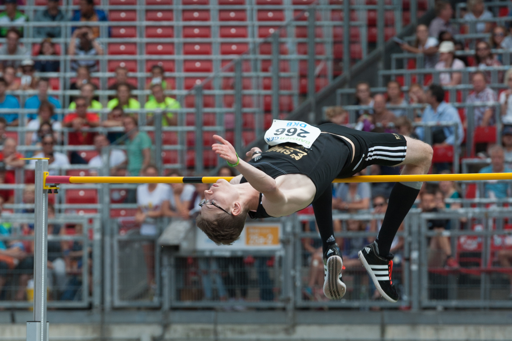 Deutsche Leichtathletik-Meisterschaften 2015: Männer Hochsprung - Tobias Potye, LG Stadtwerke München